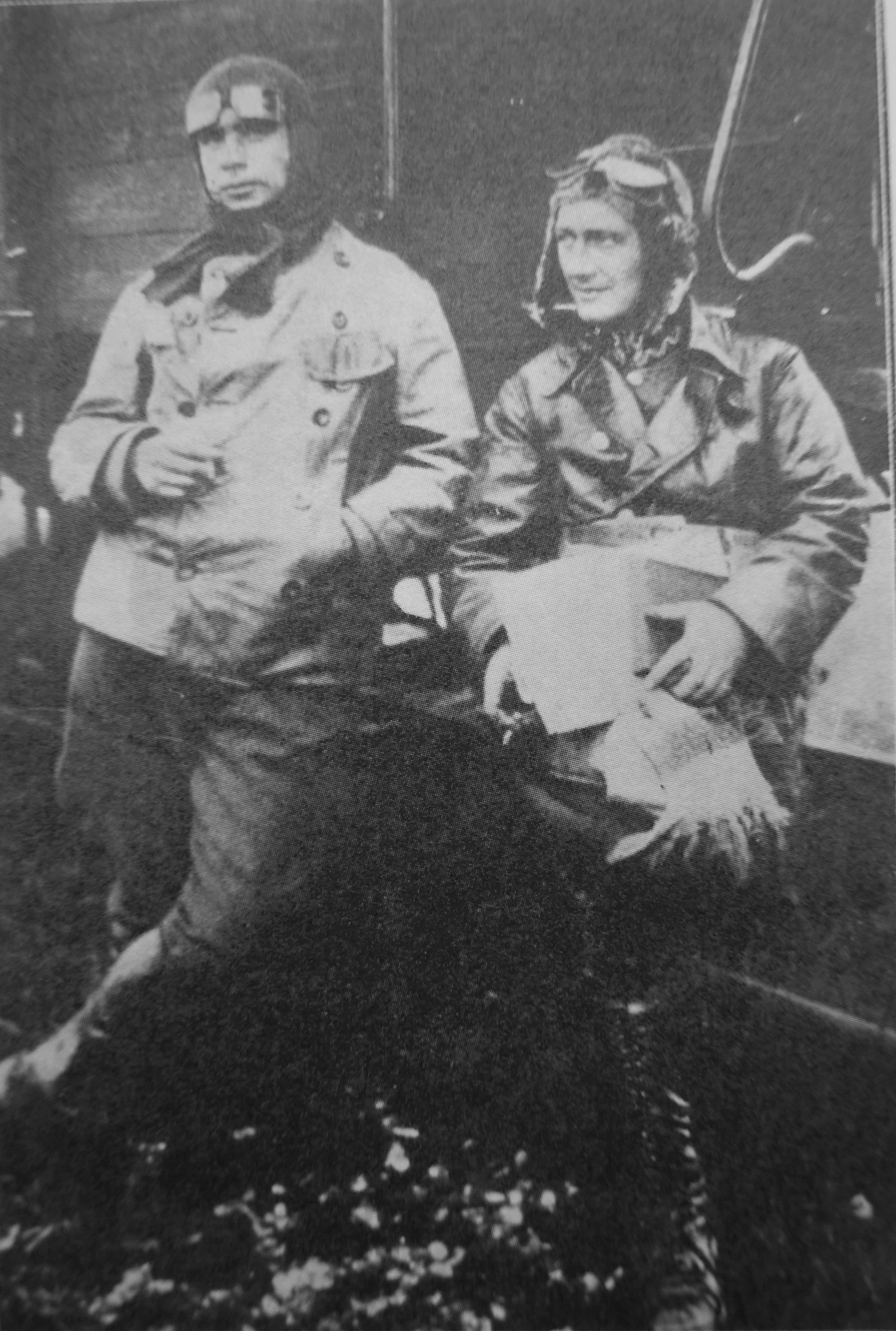 5 eskadra wywiadowcza - załoga por. pilot Władysłw Kalkus i por. obs. Władysław Popiel